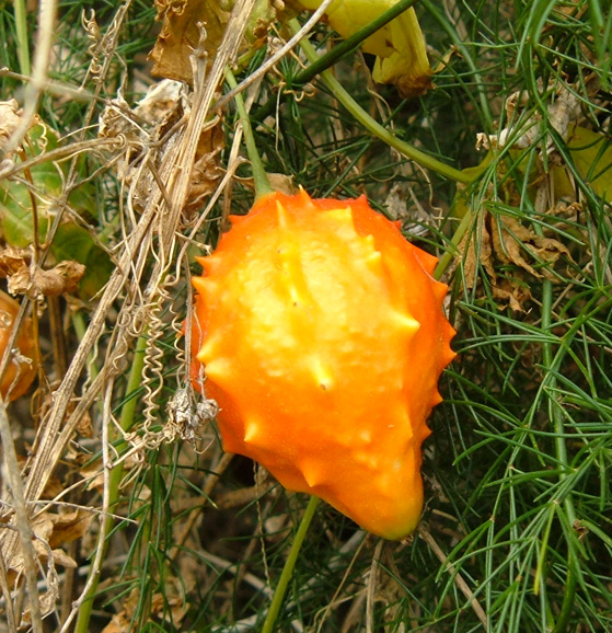 Momordica balsamina fruit. Nes-Ziona, Israel.